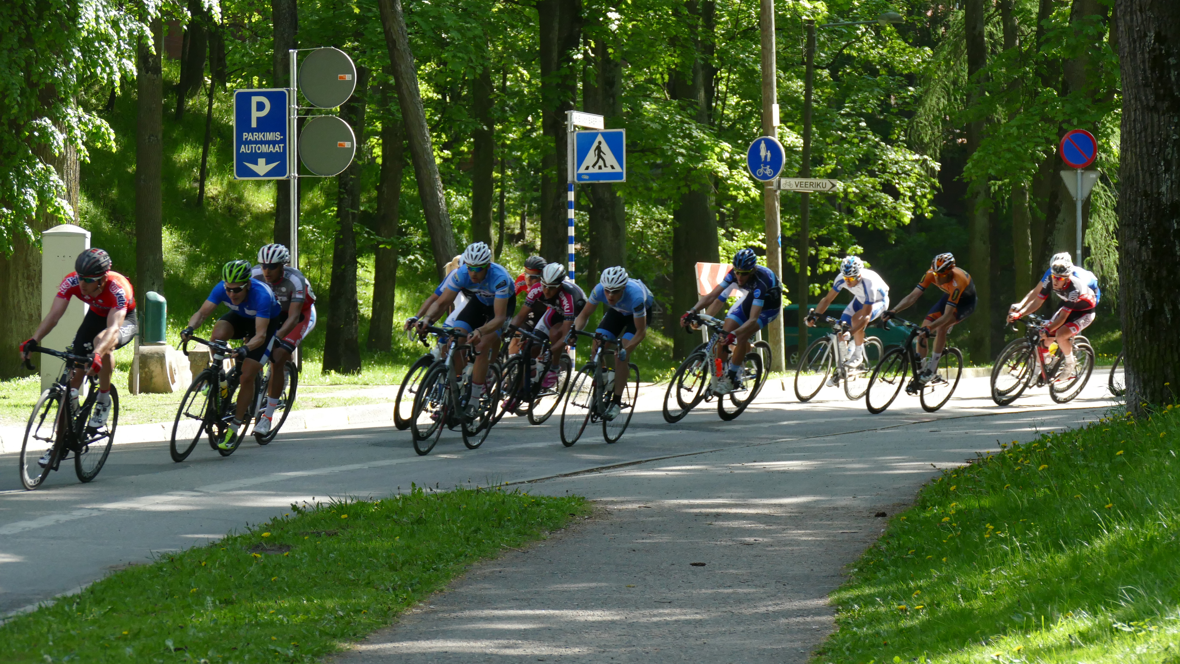 Tour of Estonia Tartu Grand Prix 2. etapp Tartu tänavatel 30.05.2015. Grupisõit 150km.